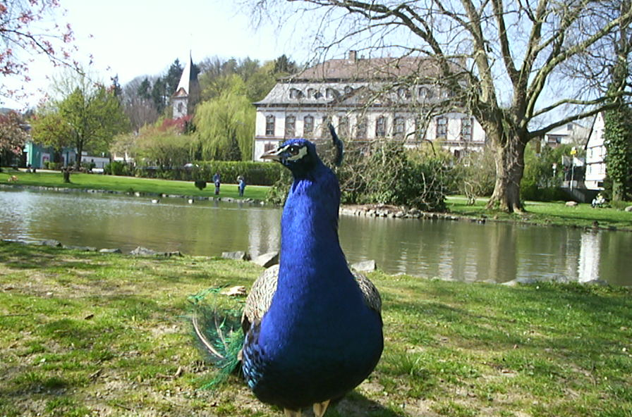 Pfau im Schlosspark in Birkenau (Odenwald)